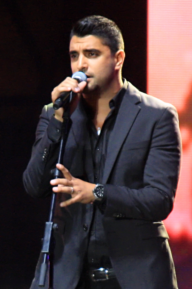 משה פרץ בשיר הפותח את טקס "במותם ציוו", ערב יום הזיכרון 2014, אמפיפארק ראשון לציון.